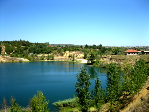 Рготско језеро Srpski (latinica): Rgotsko jezero